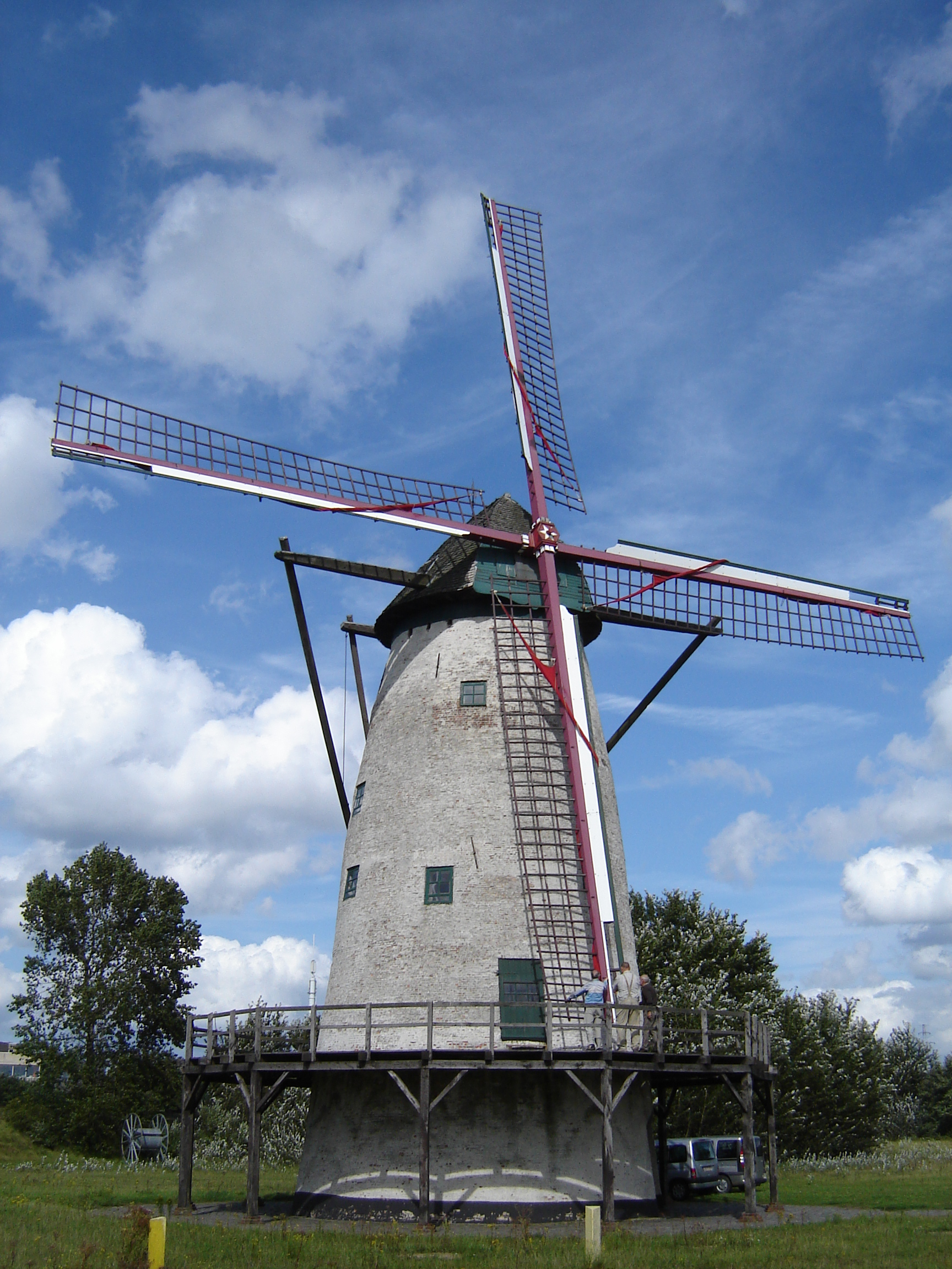 Windmolen De Eenhoorn of Witte Molen in Lillo. "De Eenhoorn" or "Witte Molen" windmill in Lillo. Lillo, Antwerp, province of Antwerp, Belgium